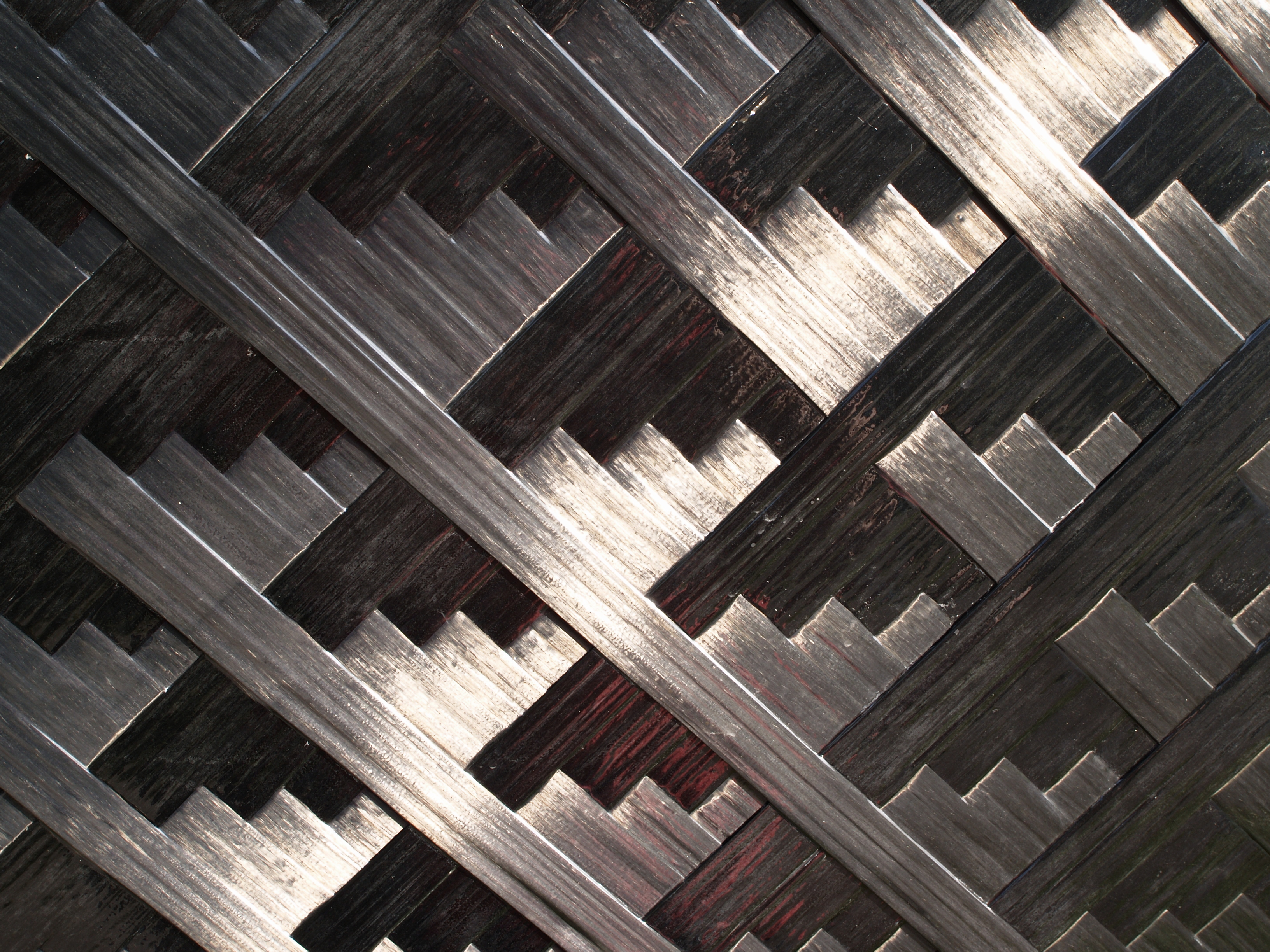 Carbon Obelisk ein aus Carbonfasern bestehender hohler Obelisk von Rita McBride, errichtet auf der Emscherinsel in Essen anlässlich der Emscherkunst.2010, Detail des Carbonfaserwickels. Hergestellt in Wickeltechnik bei CGB Carbon Grossbauteile GmbH in Wallerstein .